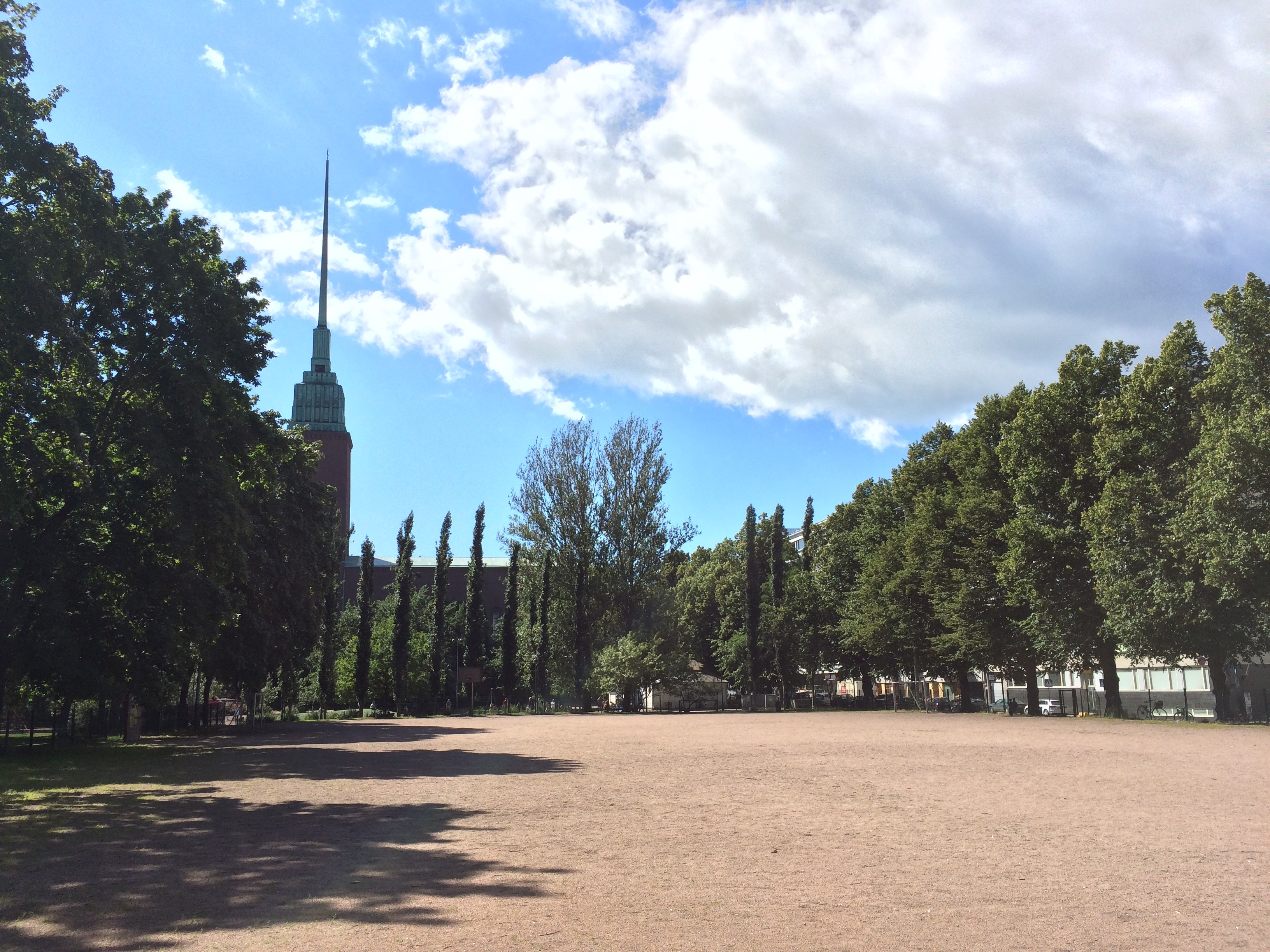 Näkymä jalkapallokentän poikki Helsingin Tehtaanpuistossa. Taustalla Mikael Agricolan kirkko.